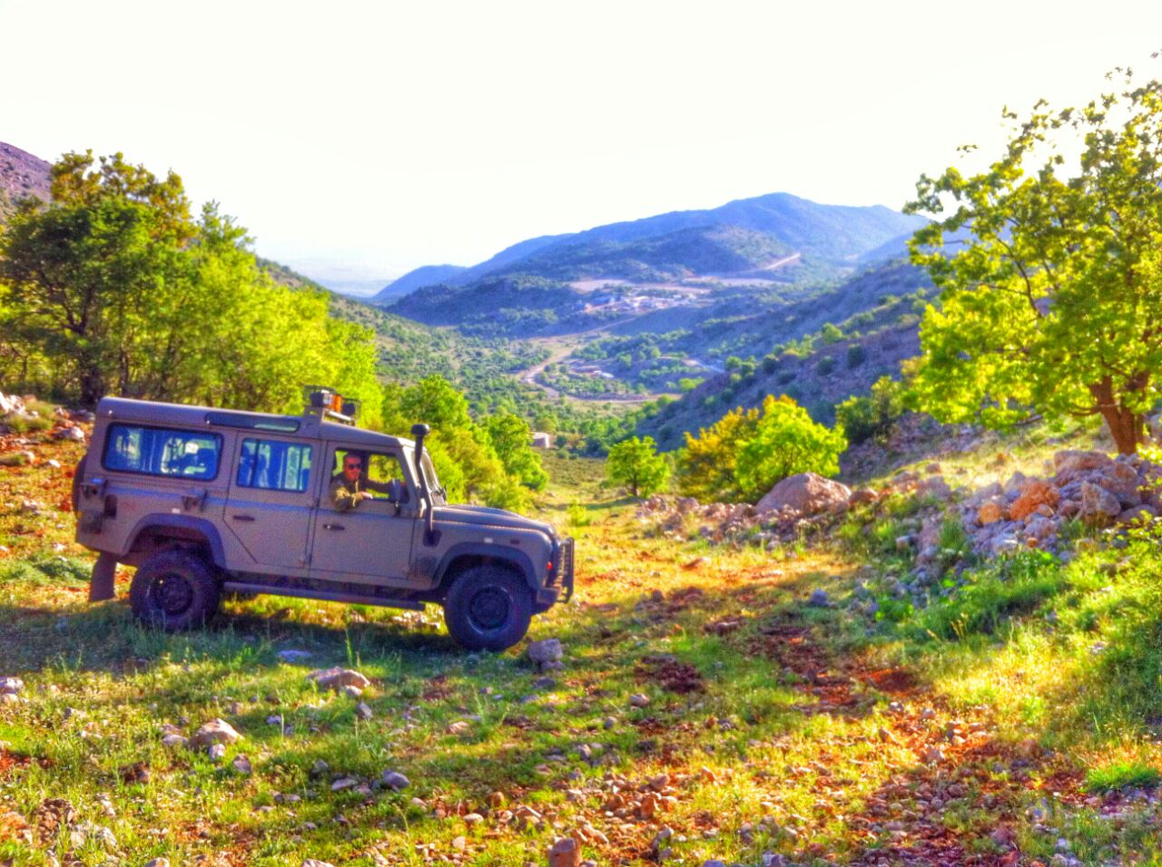 ששששש